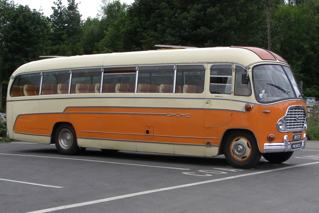 1959 Bedford SB Coach Registration 181ECV at Buckfastleigh, Devon, England in August 2006